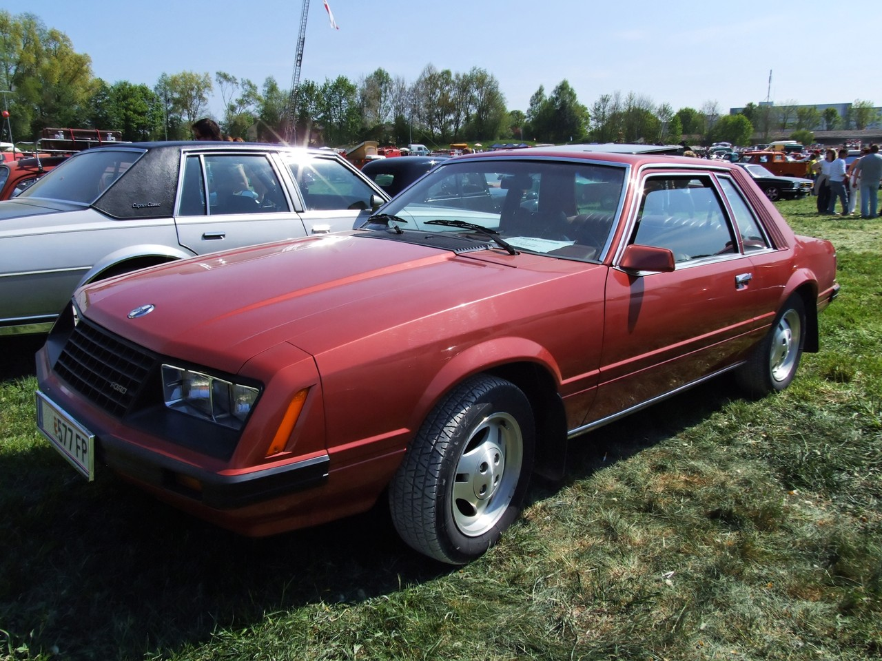 Quelle: selbst fotografiert, 04/2007 Fotograf: Späth Chr.